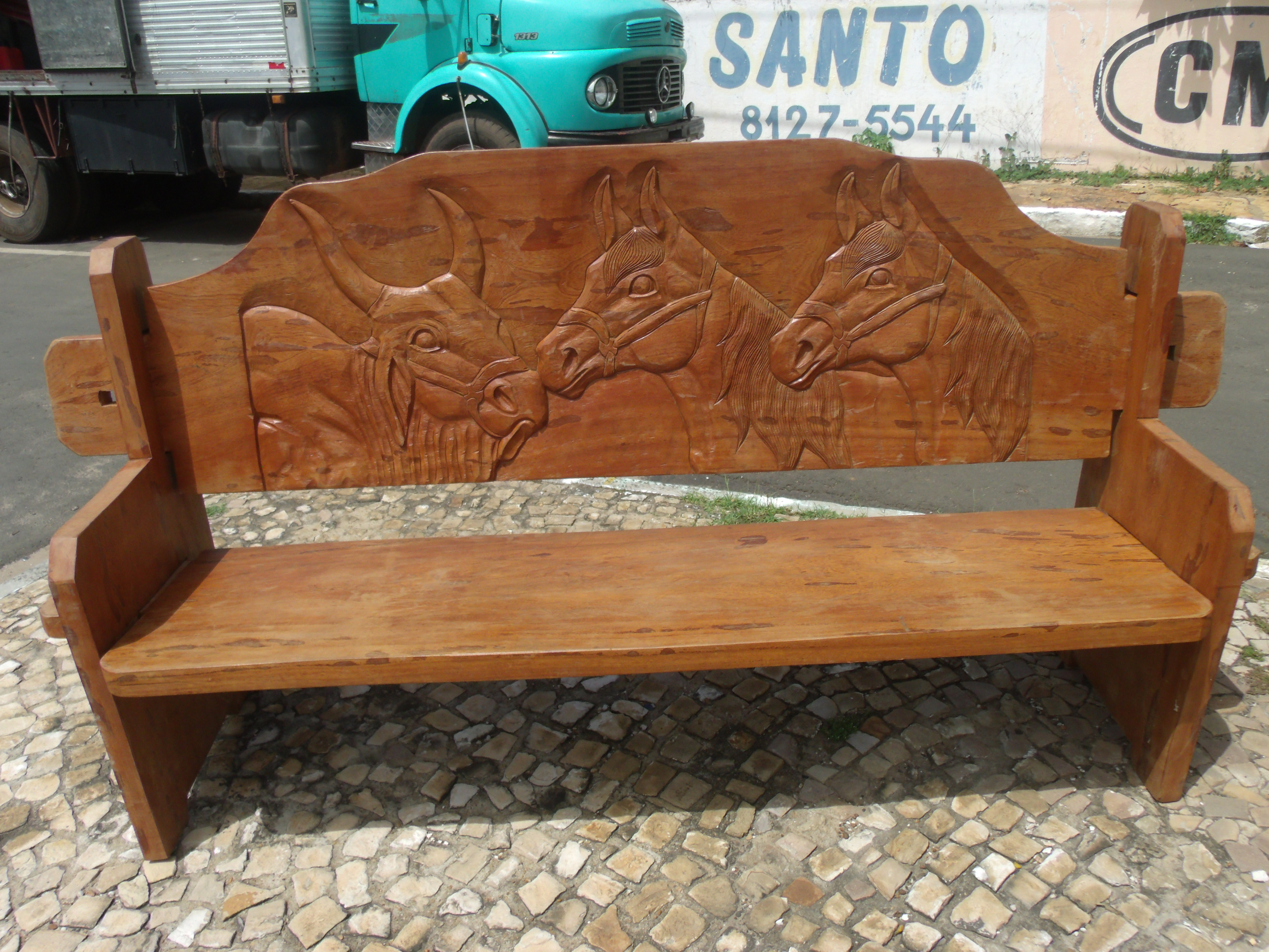 Banco de madeira decorado em relevo em uma feira de Campo Maior.